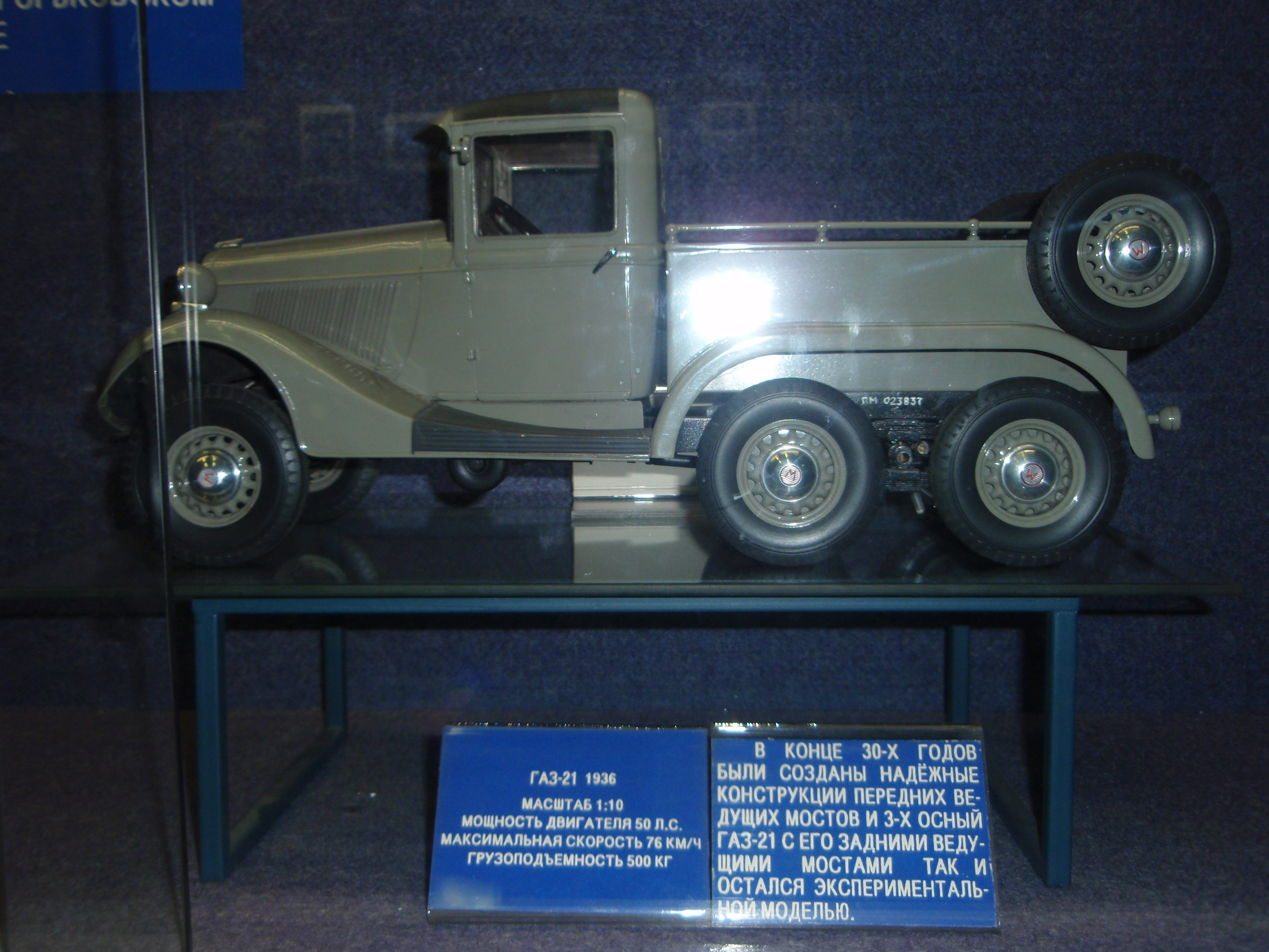 Советский автомобиль ГАЗ-21 1936 г. (модель), Государственный Политехнический музей (г.Москва)